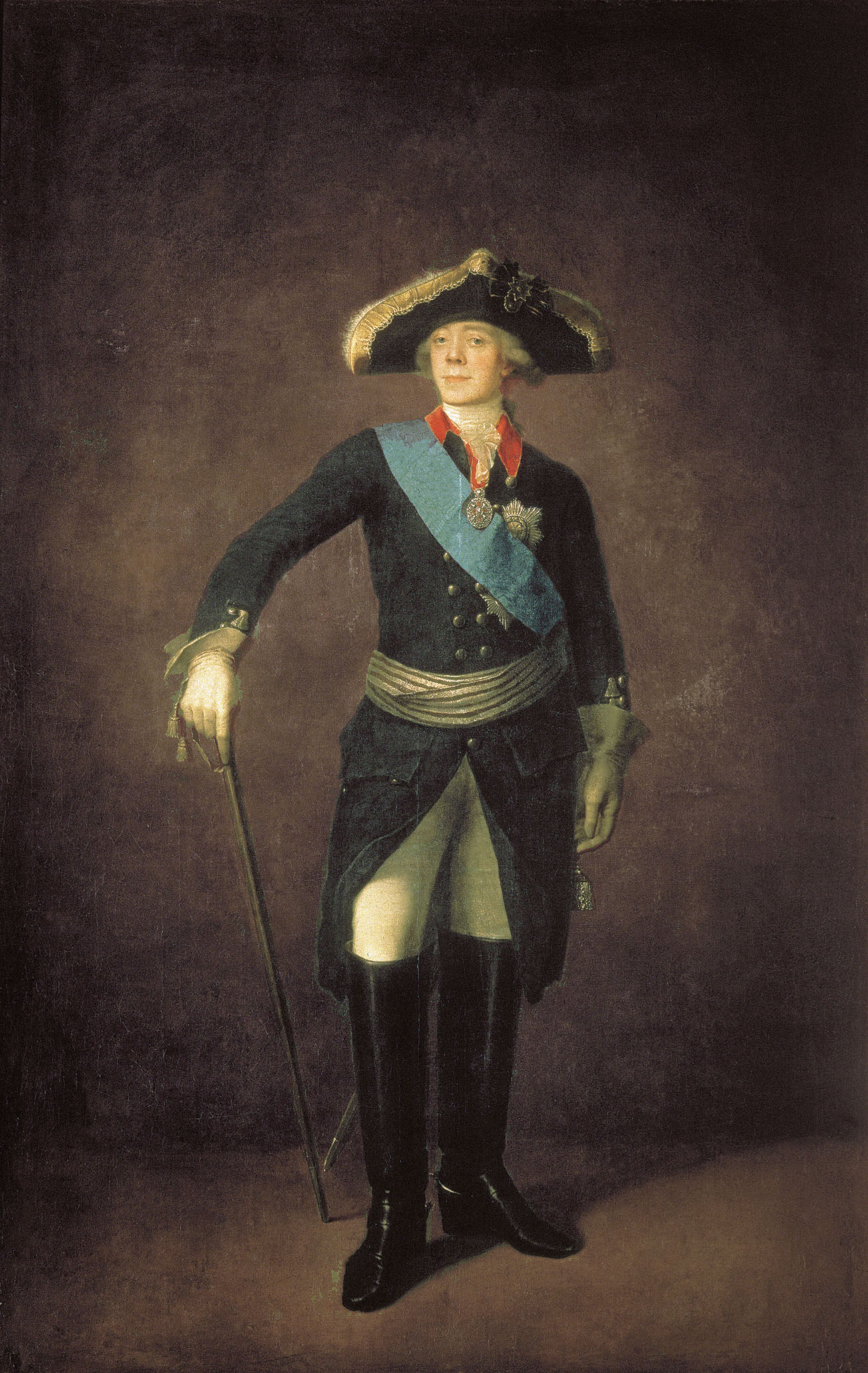 Павел I (1754–1801), сын Петра III и Екатерины II. С 1796 – российский император. Портрет написан вопреки традициям, сложившимся в парадных императорских изображениях. Он полностью лишен атрибутов, говорящих о высоком положении героя: в картине нет короны, скипетра, горностаевой мантии, непременно присутствующих в других подобного рода произведениях. В отличие от своих династических предшественников, изображенных в пышных дворцовых интерьерах, Павел предстает на портрете так, словно окружен пустотой. Нарушив сложившуюся схему императорского портрета, Щукин сумел передать дух павловского времени – сложный и противоречивый период в истории России. Изолируя героя от мира вещей и предметов, художник тем самым ставит его в исключительное положение. Павел предстает как явление на пустой сцене, как будто именно с него начинается история. Столь лаконичное решение возводит героя на недосягаемую высоту, ибо он должен быть узнан без многочисленных объясняющих деталей.